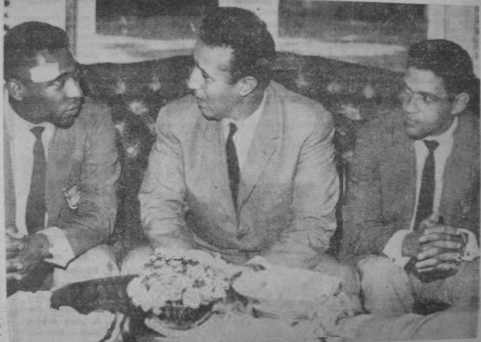 Photographie du président algérien de l'époque Ahmed Ben Bella accompagné des deux joueurs brésiliens Pelé (à droite) et Garrincha (à gauche)